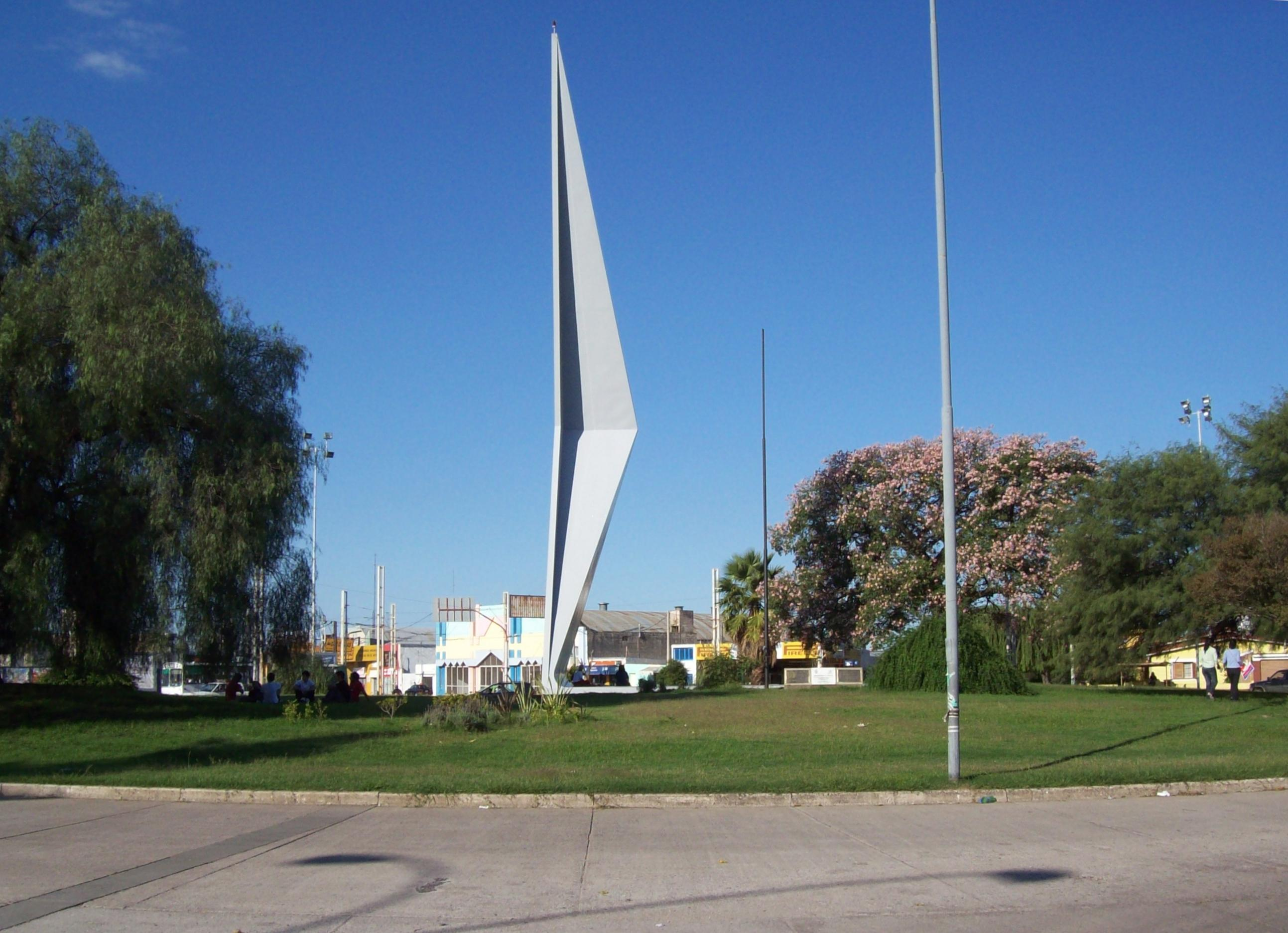 Vista del monumento en la rotonda